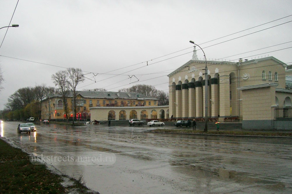 ДК им.Ефремова, Новосибирск